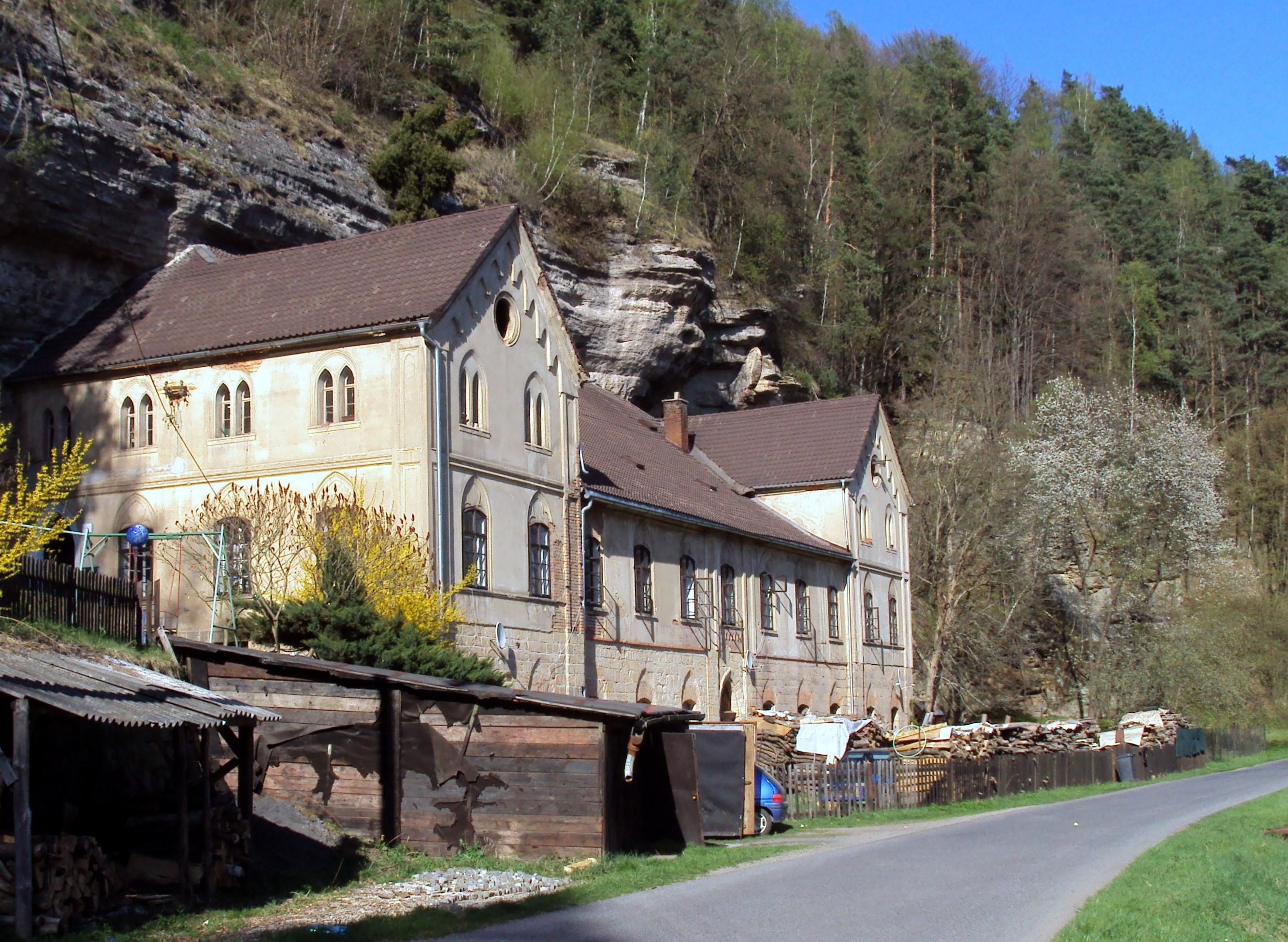 Lindava č. p. 308, samota u silnice Svitava - Velenice na Českolipsku, katastr Svitava u Cvikova, někdejší brusírna hraběte Kinského